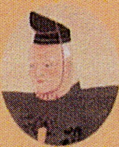 広瀬藩主松平近栄の肖像(部分)。